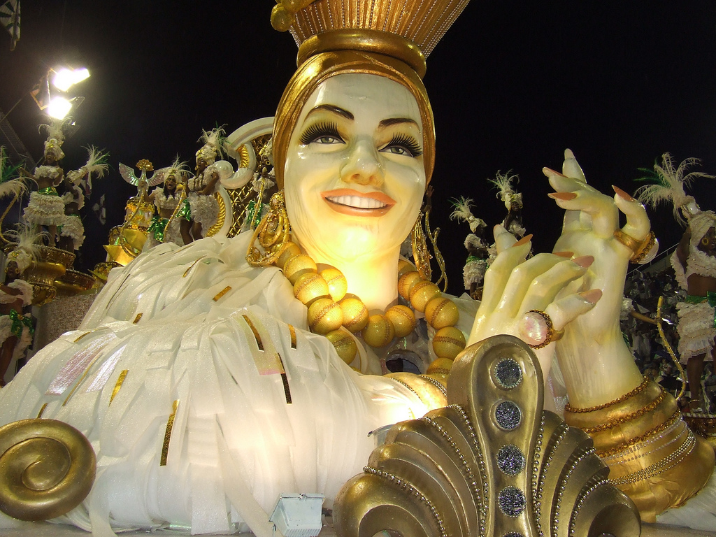 Ticoticolá...